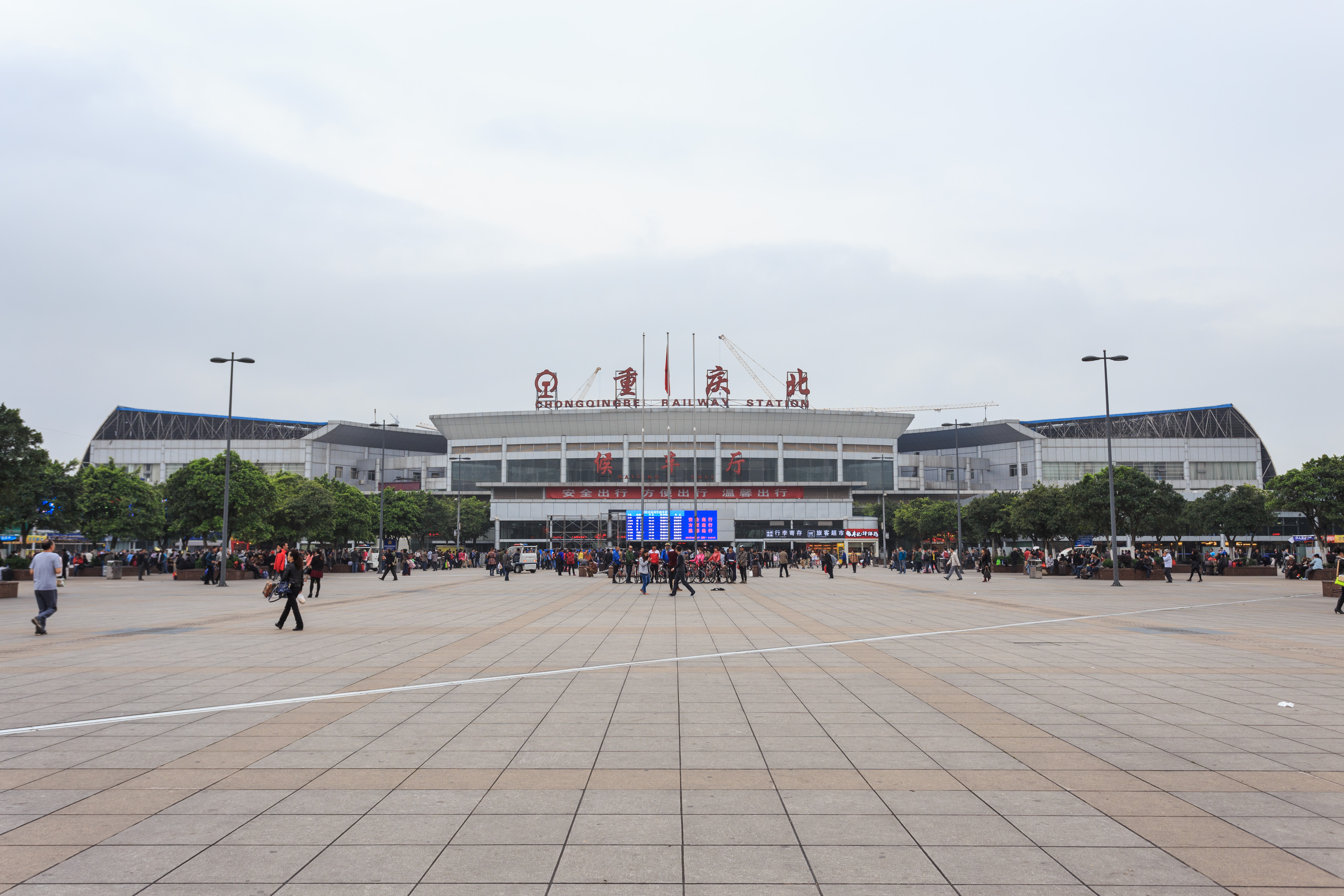 重庆北站